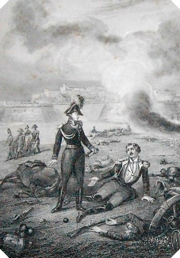 Incisione tratta da "La bella di Camarda" (1857), novella di Emidio Cappelli.